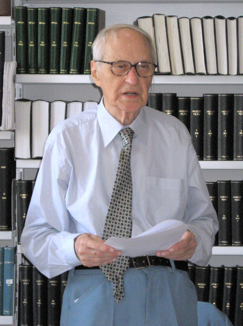 Köpeczi Béla (Nagyenyed, Románia, 1921. szeptember 16. – Budapest, 2010. január 17.) művelődés- és irodalomtörténész, művelődéspolitikus, az irodalomtudomány kandidátusa (1959) és doktora (1965), a Magyar Tudományos Akadémia rendes tagja, 1972-től 1975-ig főtitkára.